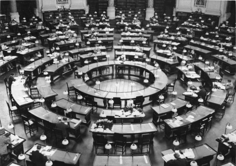 Berlin; Staatsbibliothek, Hauptlesesaal